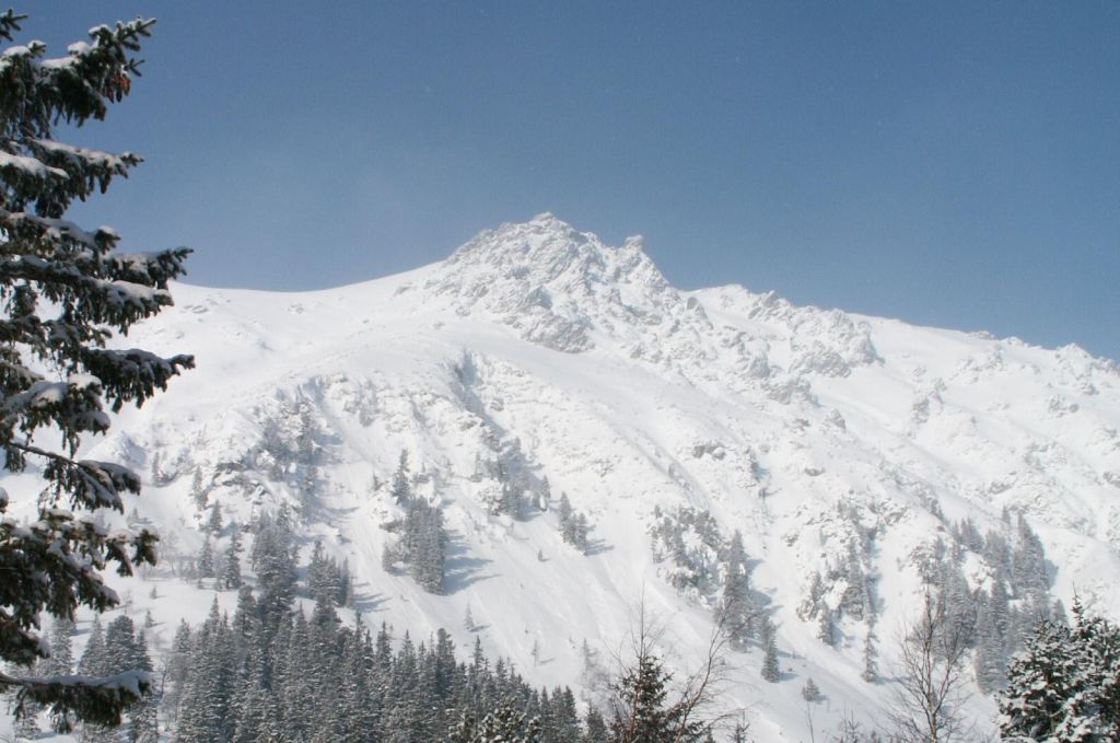 Opalony Wierch, widok znad Morskiego Oka Autor: mychaus.